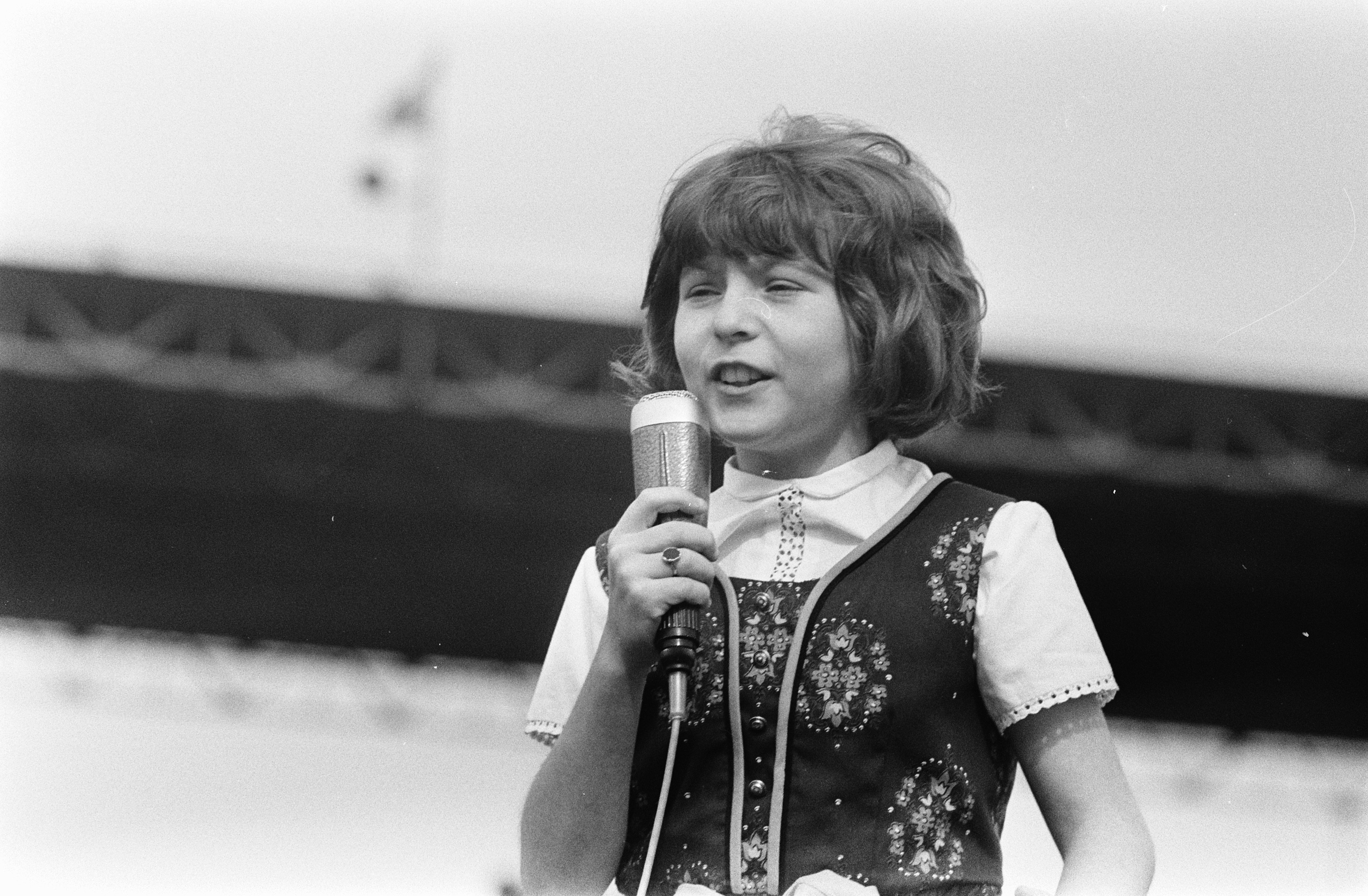 Collectie / Archief : Fotocollectie Anefo Reportage / Serie : [ onbekend ] Beschrijving : Gert en Hermien Timmerman show in Olympisch Stadion, Amsterdam Wilma Datum : 24 mei 1969 Locatie : Amsterdam, Noord-Holland Trefwoorden : stadions Persoonsnaam : Hermien Timmerman, Wilma Fotograaf : Mieremet, Rob / Anefo Auteursrechthebbende : Nationaal Archief Materiaalsoort : Negatief (zwart/wit) Nummer archiefinventaris : bekijk toegang 2.24.01.05 Bestanddeelnummer : 922-4568